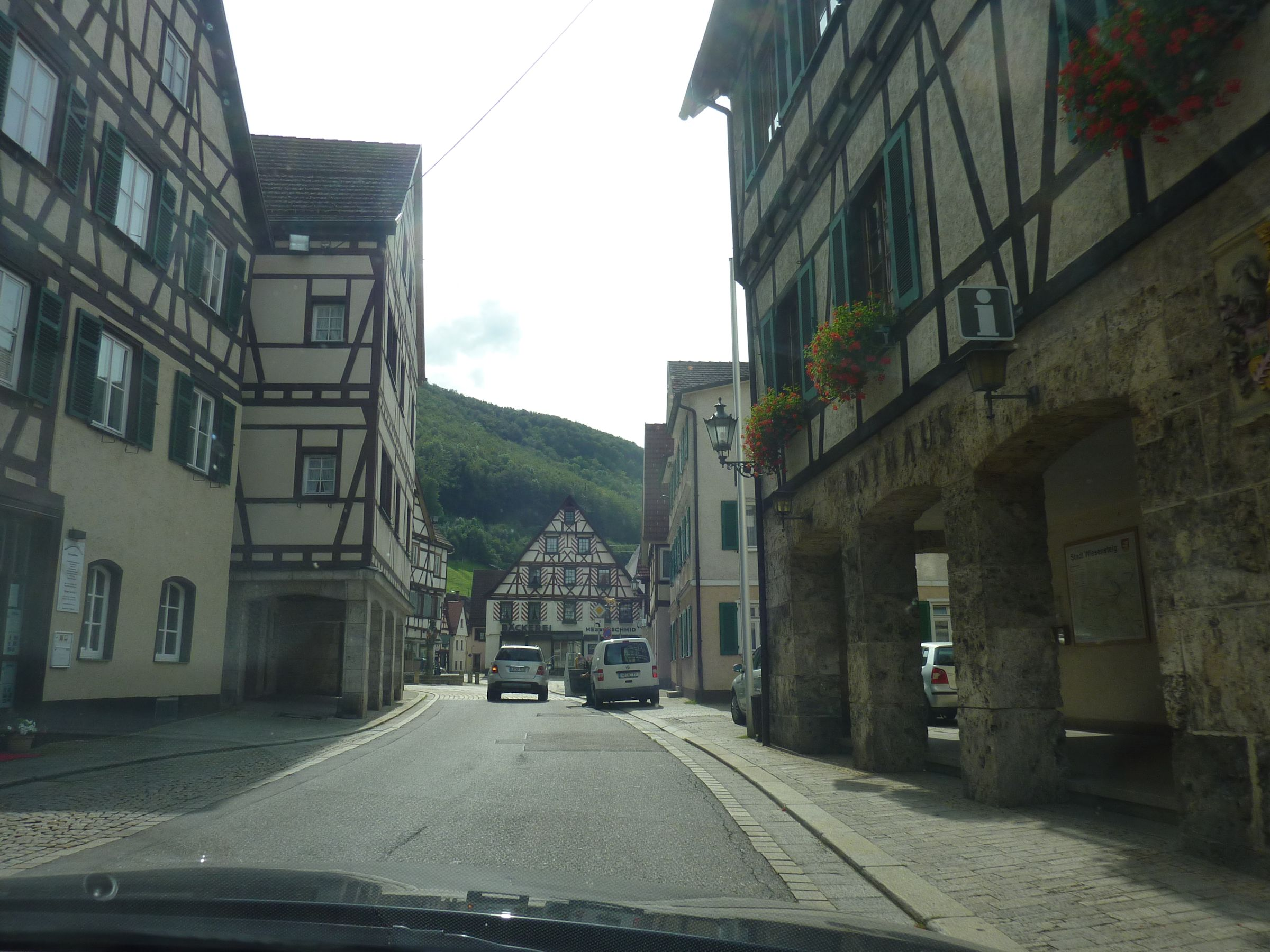 Wiesensteig